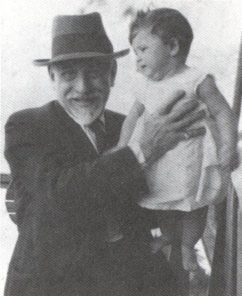 Luigi Pirandello con la nipote Maria Antonietta.